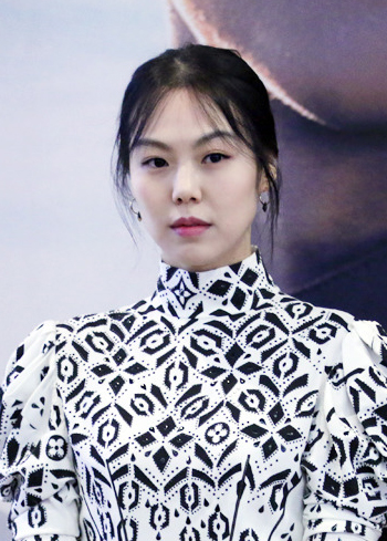 2015년 9월 17일 지금은 맞고 그때는 틀리다 시사회에서 김민희.